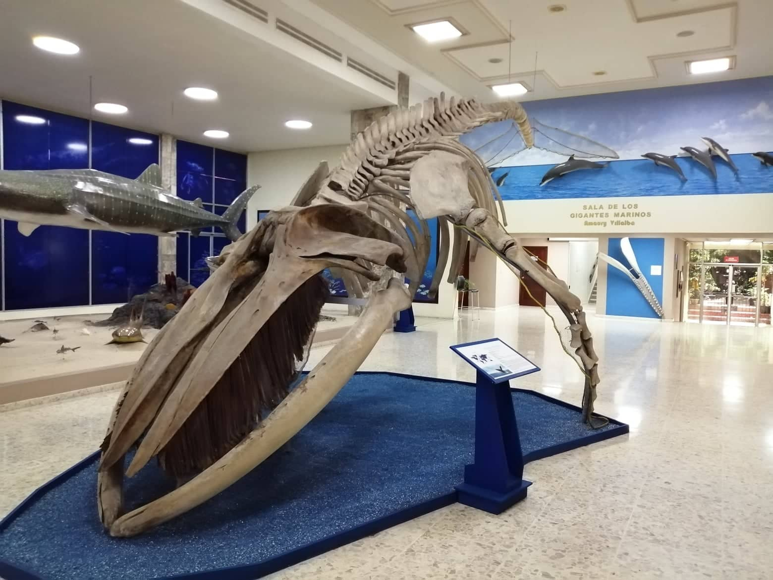 Ballena en exhibición en el Museo Nacional de Historia Natural de Santo Domingo República Dominicana, sus huesos fueron rescatados, inventariados y armados por Amaury Villalba